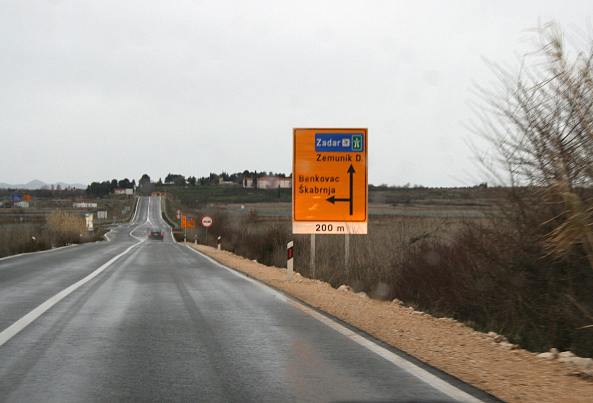 Zagreb_Split